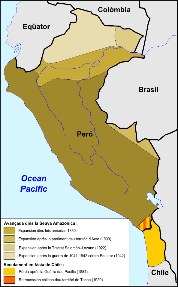 Evolucions territòtialas de Peró deis annadas 1880 ais annadas 1940.